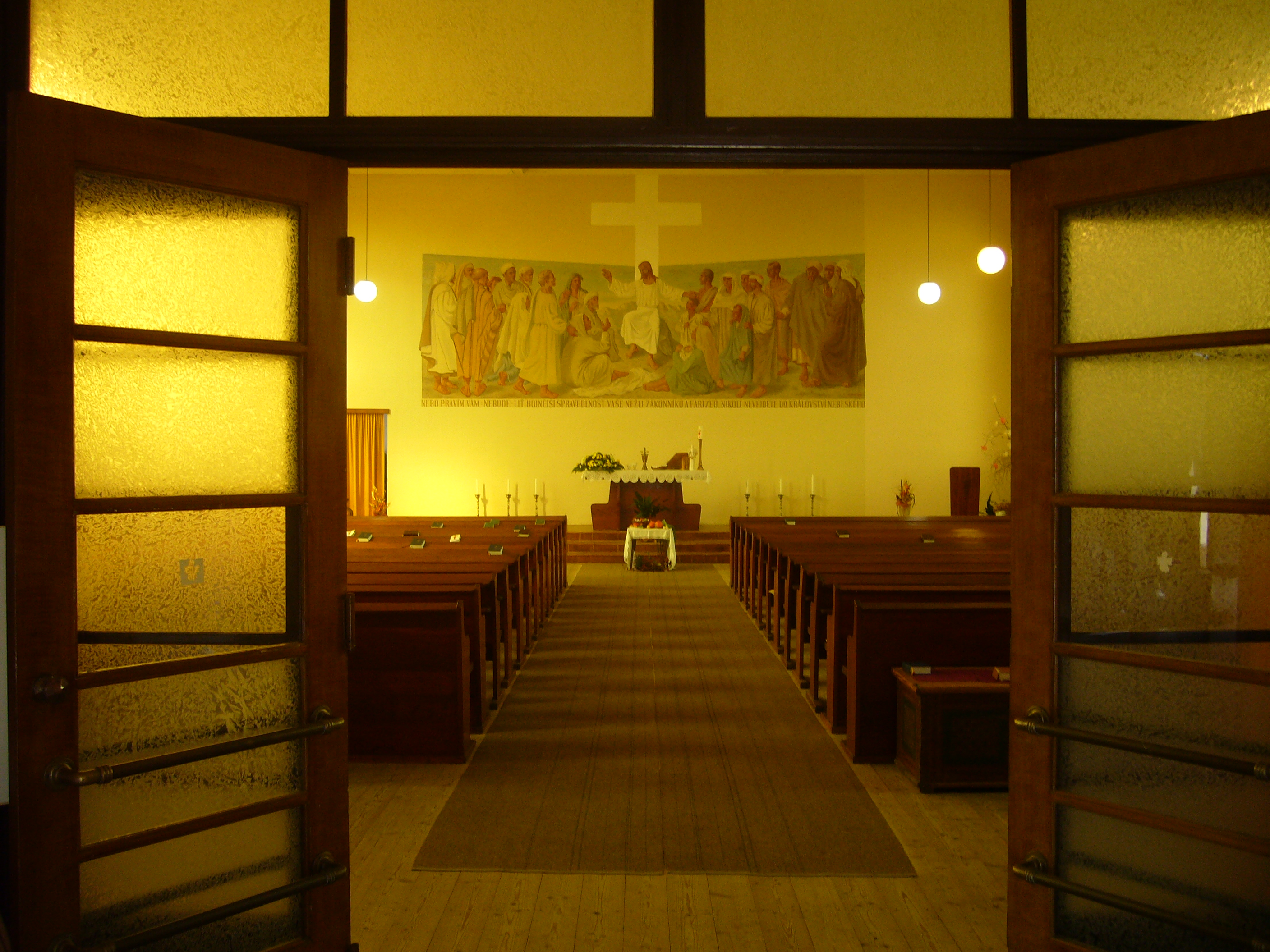 interiér